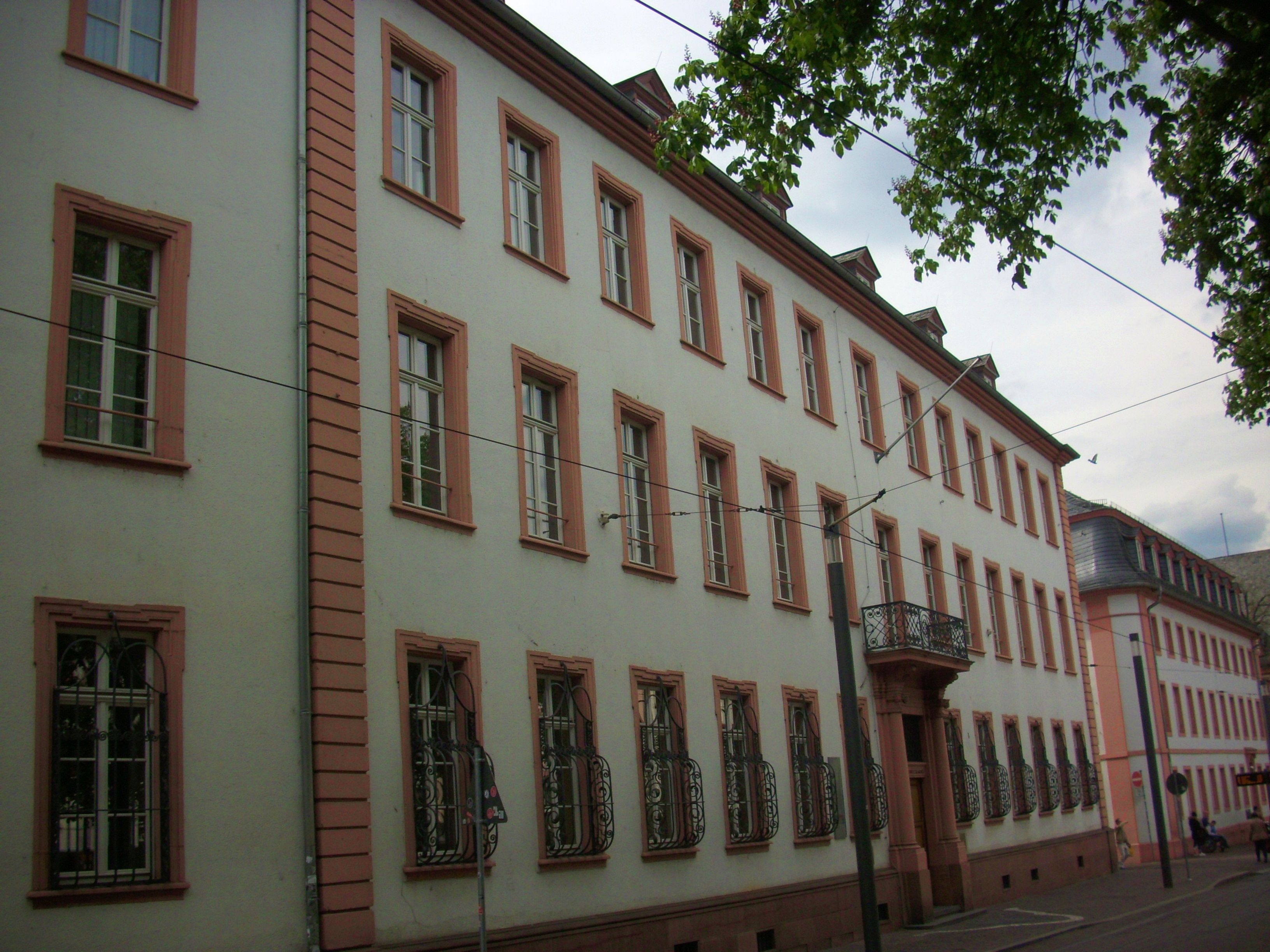 Fremdenbau des Weißfrauenklosters Schillerplatz 7. Heute Behördenhaus der IHK für Rheinhessen, dreigeschossiger, barocker Walmdachbau, 1718, Erweiterung und Aufstockung 1863